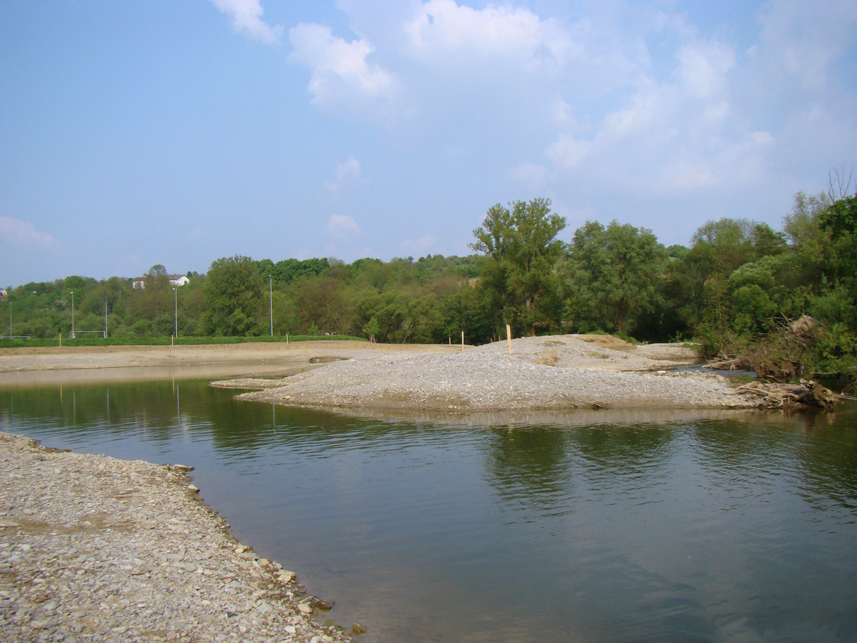 Jagstaufweidung bei Neudenau-Herbolzheim